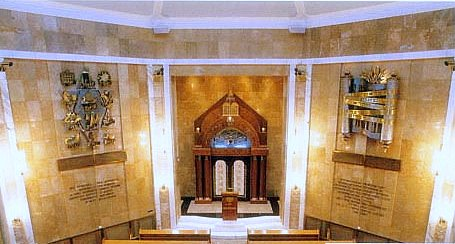 Мемориальная синагога на Поклонной горе (Москва)